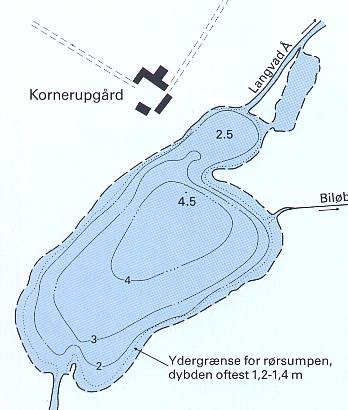 Map of Kornerup lake